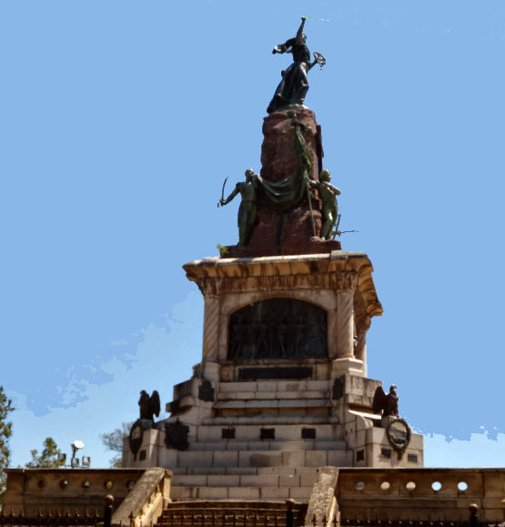 Fotografía del monumento "20 de Febrero"